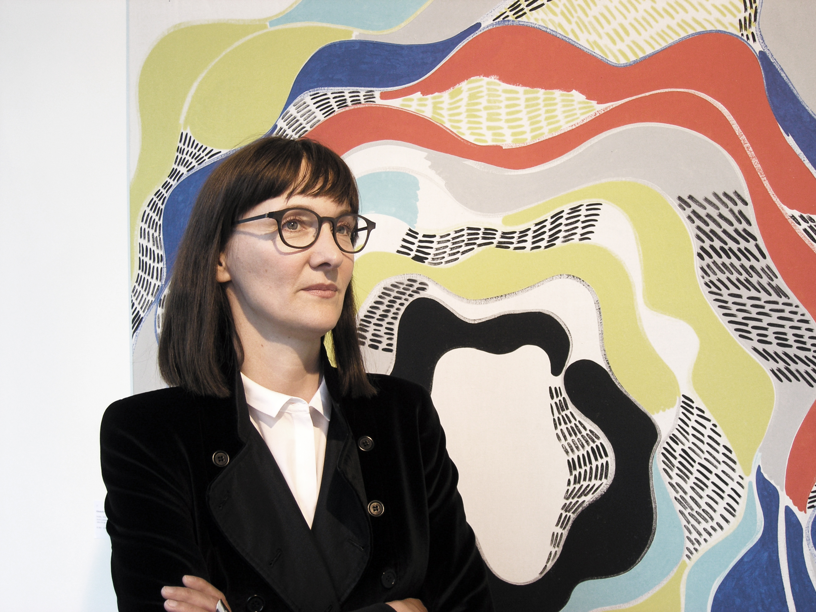 Ausstellungseröffnung Elisabeth Plank in der Galerie in der Schmiede / Ausstellungseröffnung Elisabeth Plank "ONLINE KOMPOSITIONEN" 24.04.2018